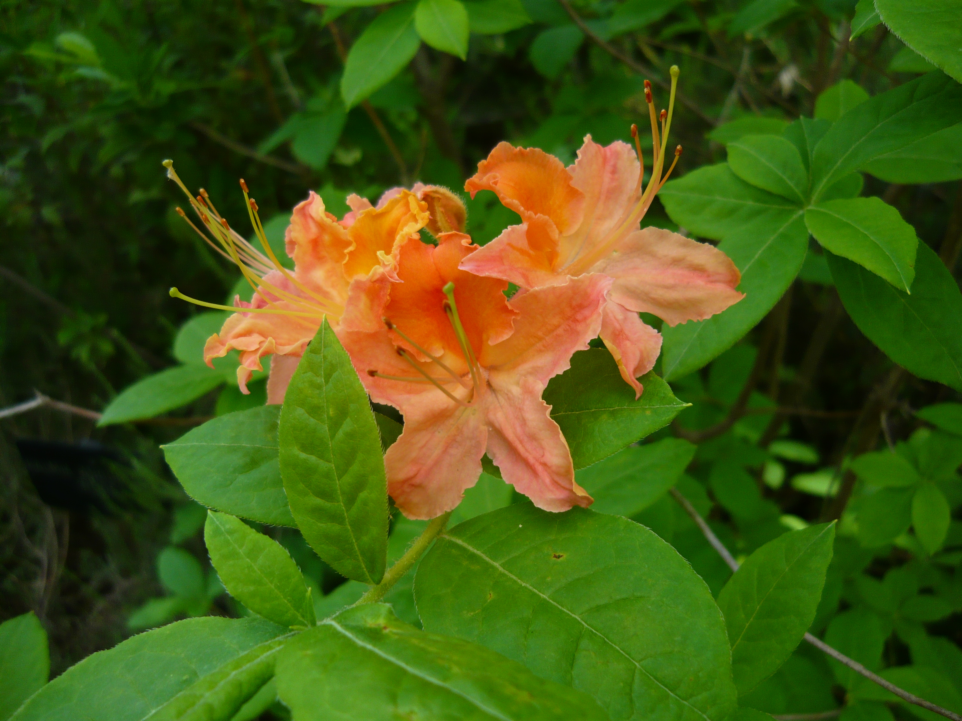 Rhododendron calendulaceum. Real Jardín Botánico de Madrid.